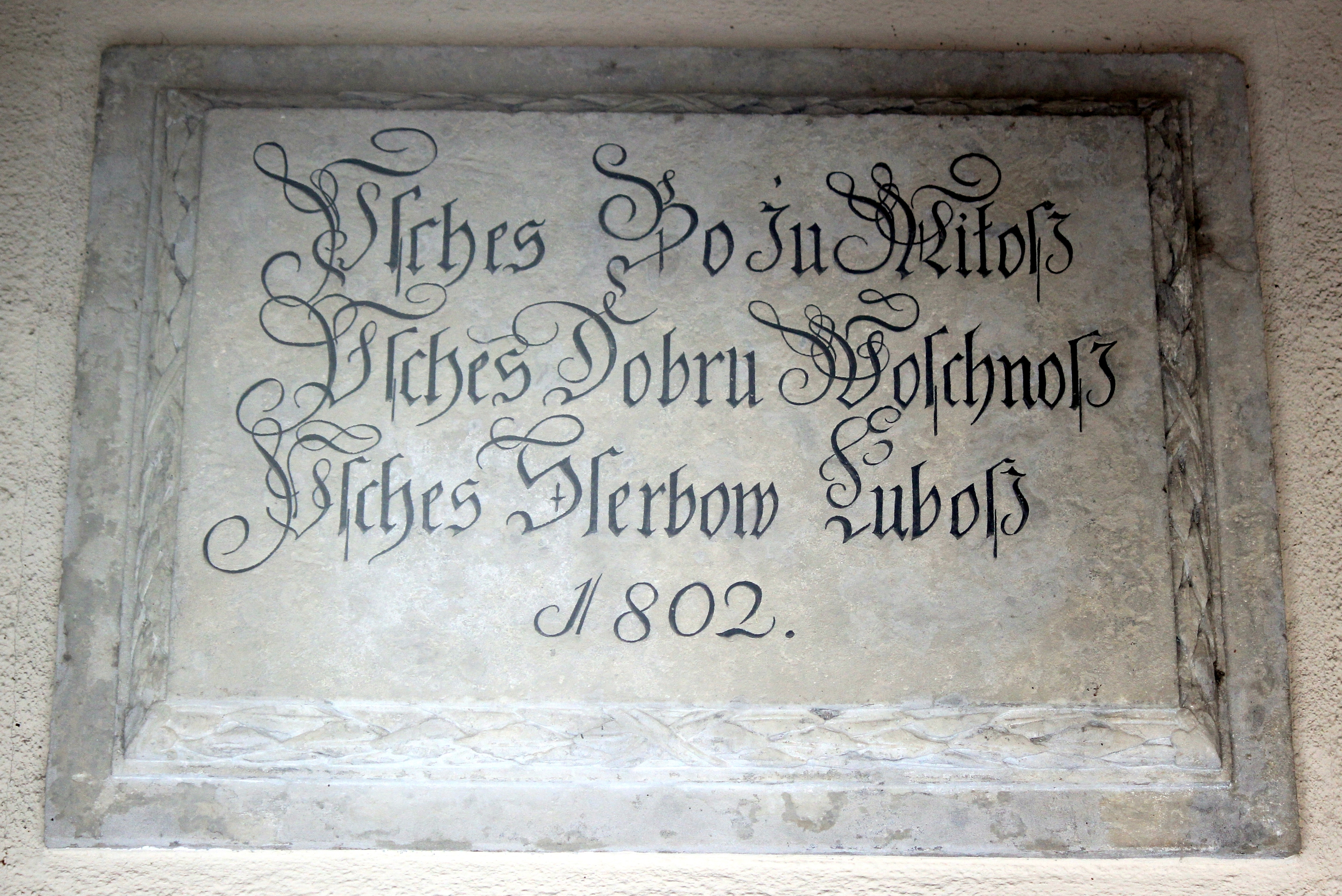 Hornjoserbsce: Tafla ze serbskim napisom z lěta 1802 při farje na Serbskim kěrchowje w Budyšinje (jedyn z najstaršich serbskich napisow w zjawnym rumje).